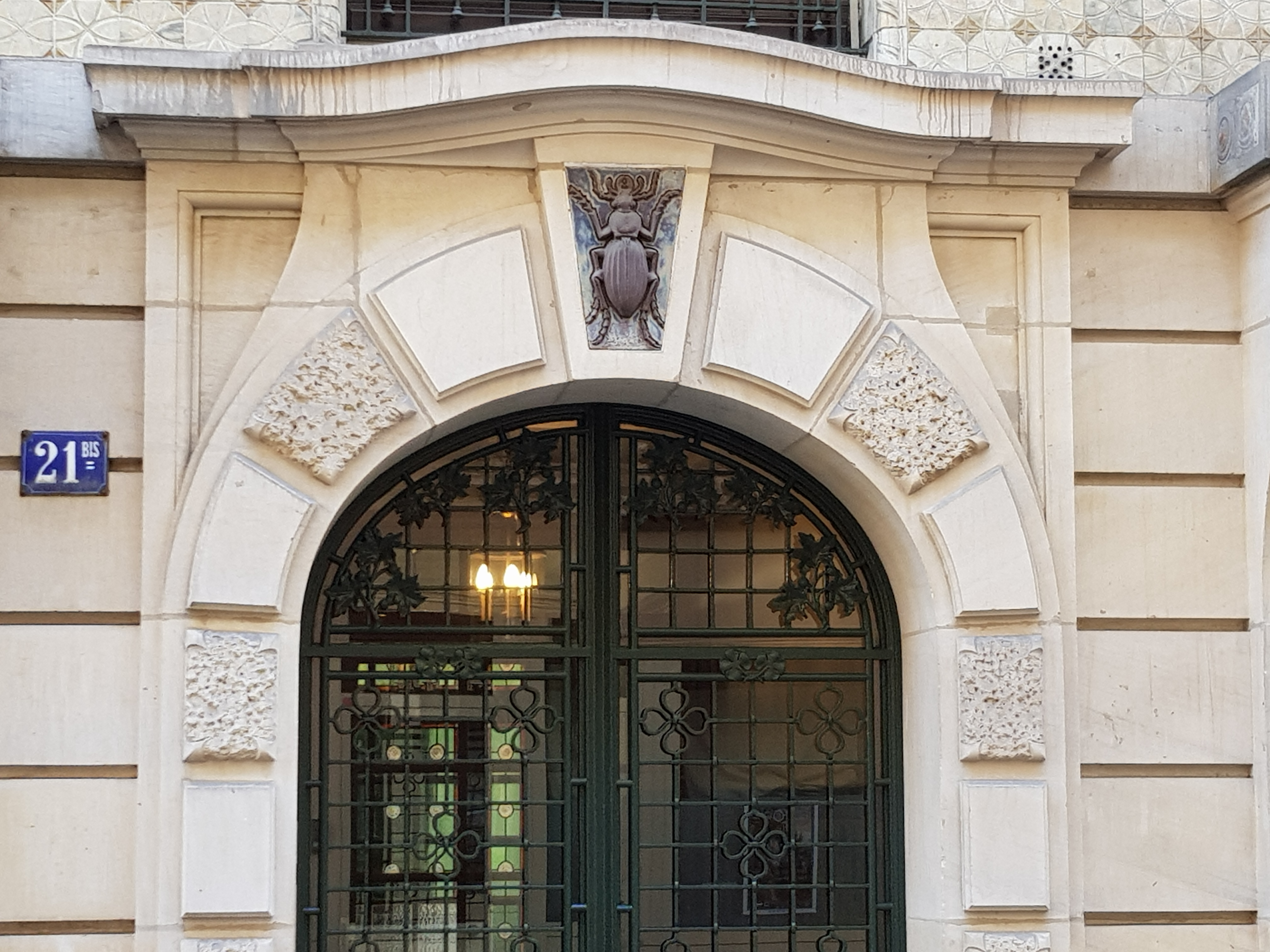 Entrée du 21bis, rue Pierre-Leroux, Paris 7e : détail de la façade.